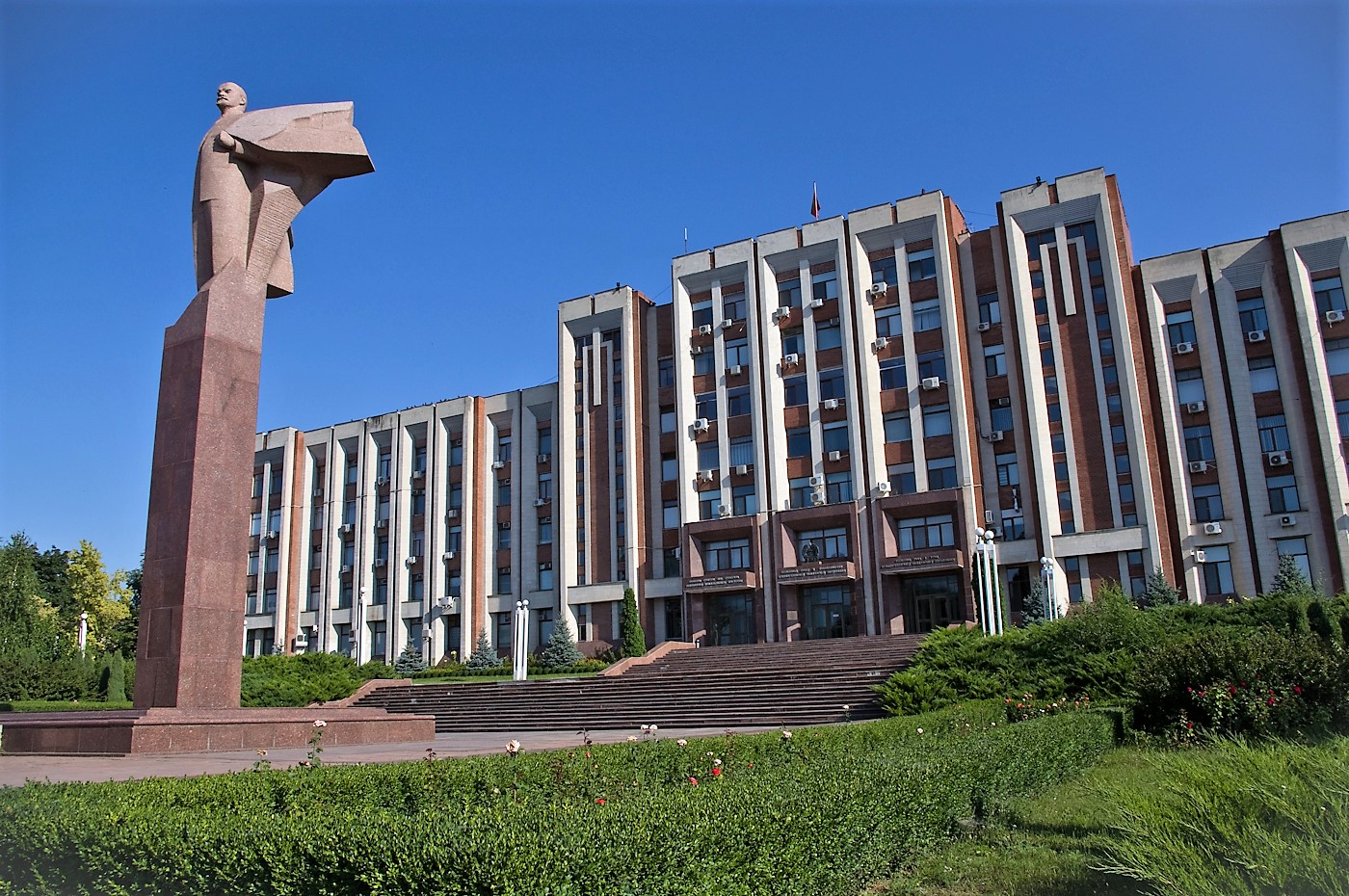 Здание Верховного Совета и Правительства ПМР. Лично мне жутко не нравится когда фасад здания портят установкой кондиционеров!!!